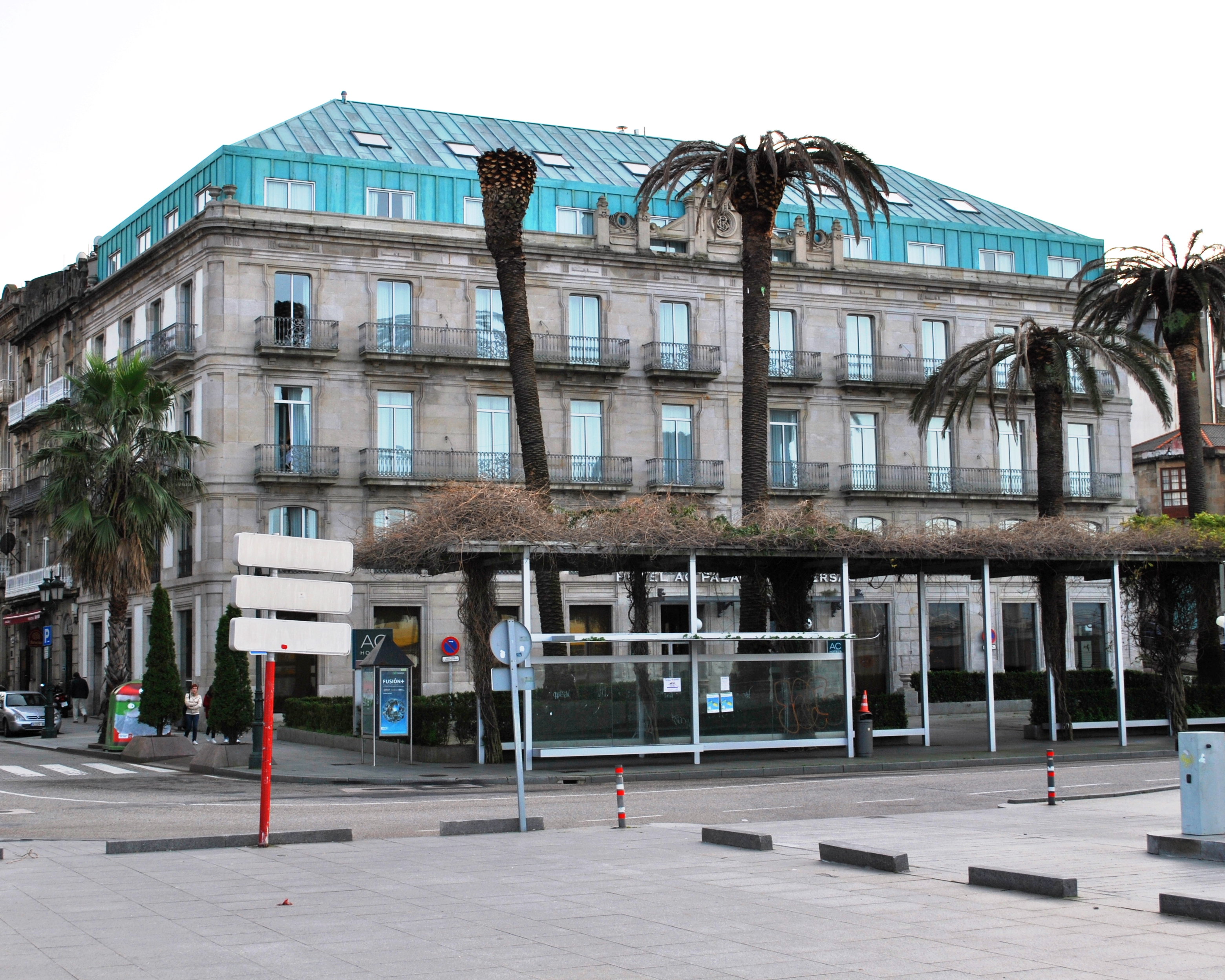 Véxase o título e as categorías